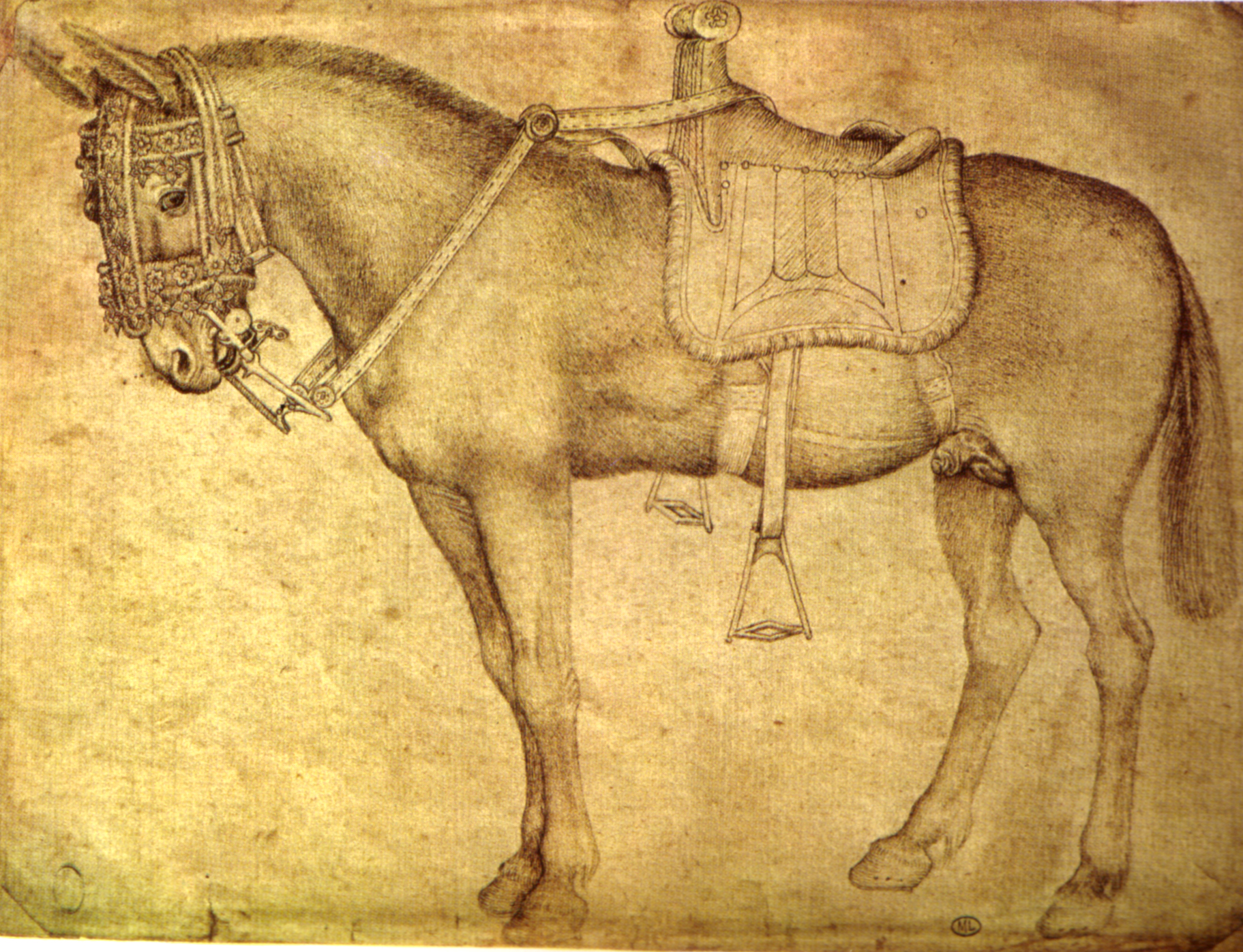 Pisanello, disegni, louvre 2325.jpg